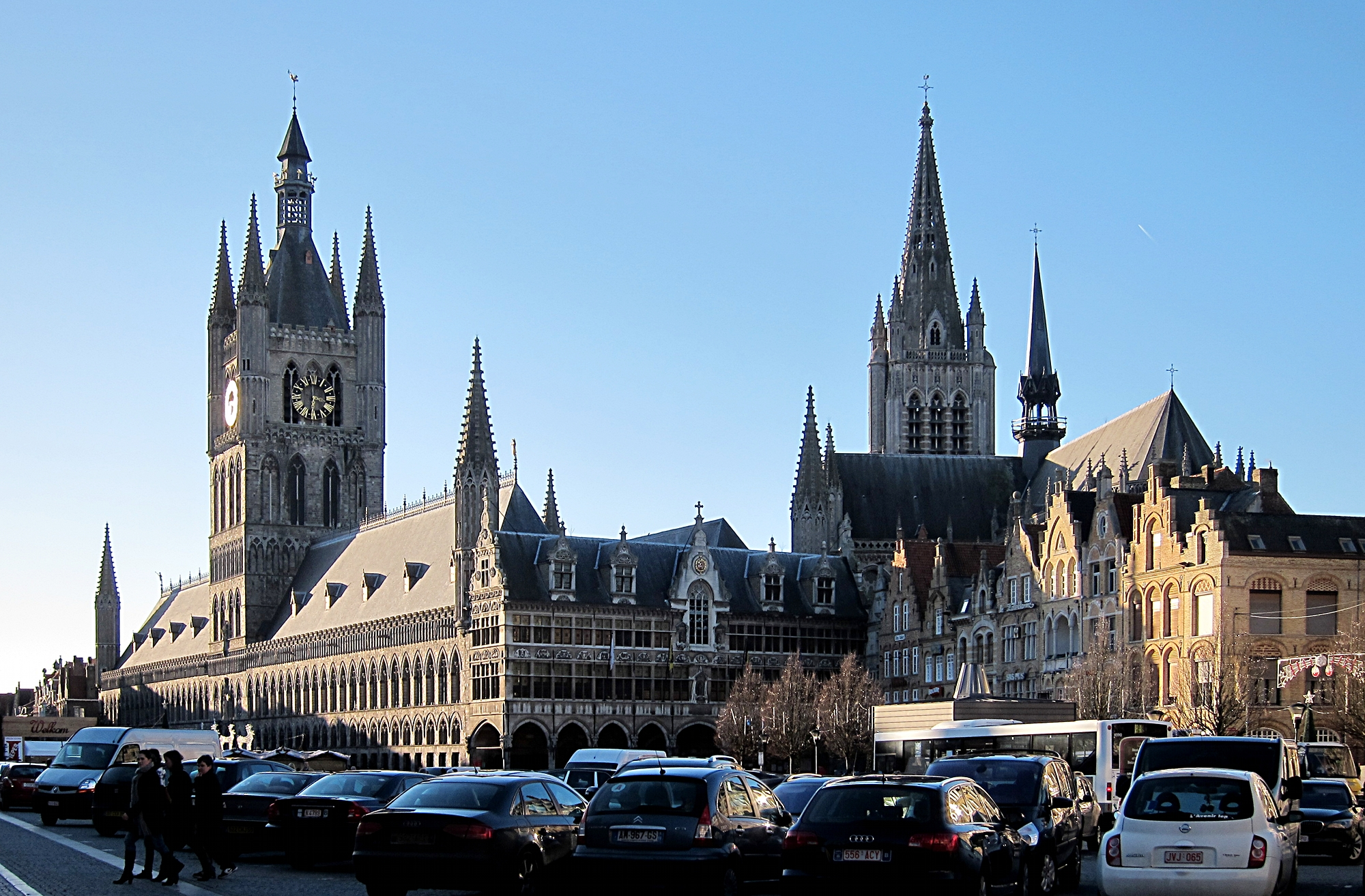 La grand place d'Ypres (Belgique).